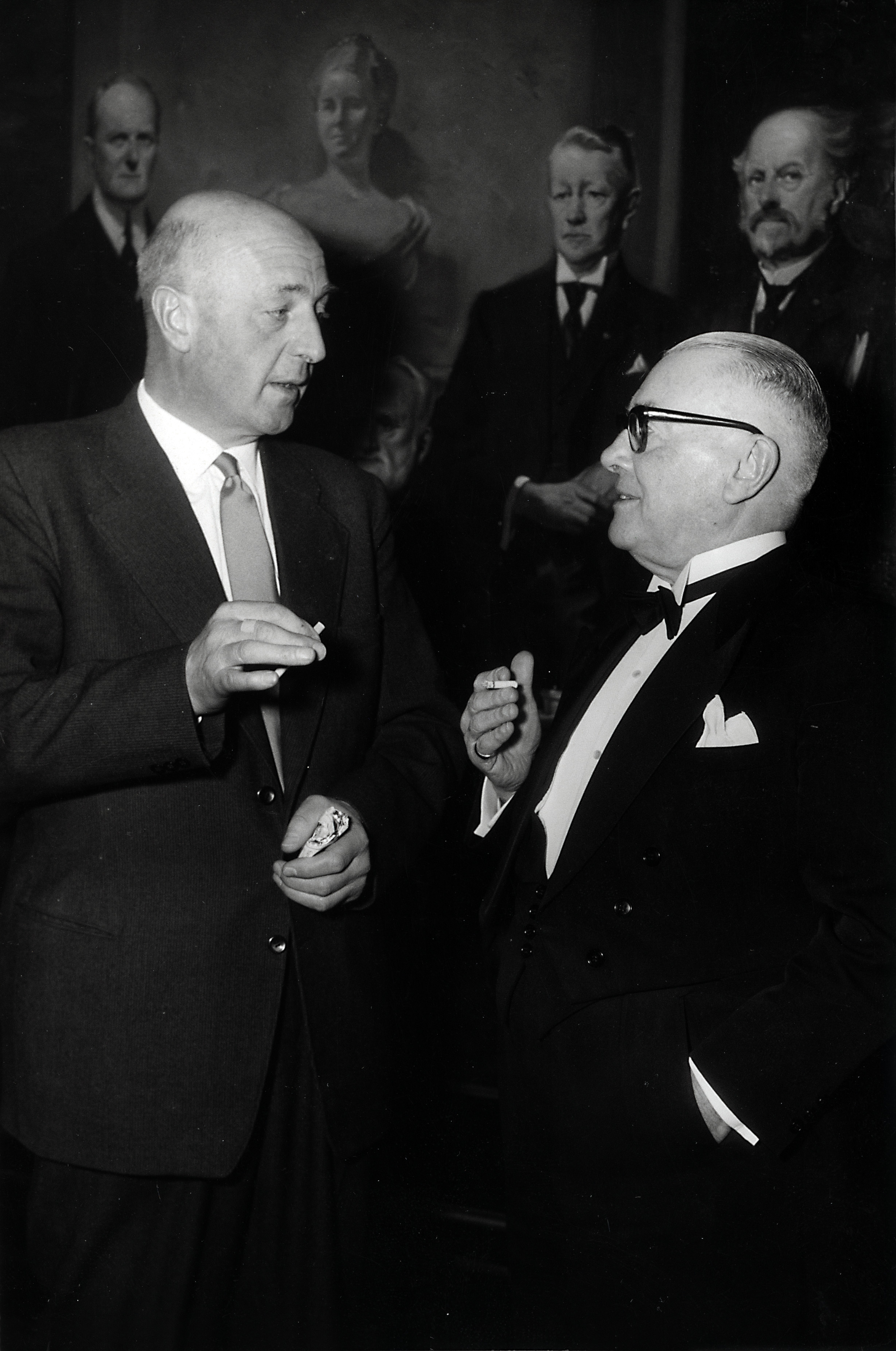 Minister Sicco Mansholt(SDAP/PvdA) in gesprek met de voorzitter van de Tweede Kamer Kortenhorst. Den Haag, Nederland, 12 december 1957.